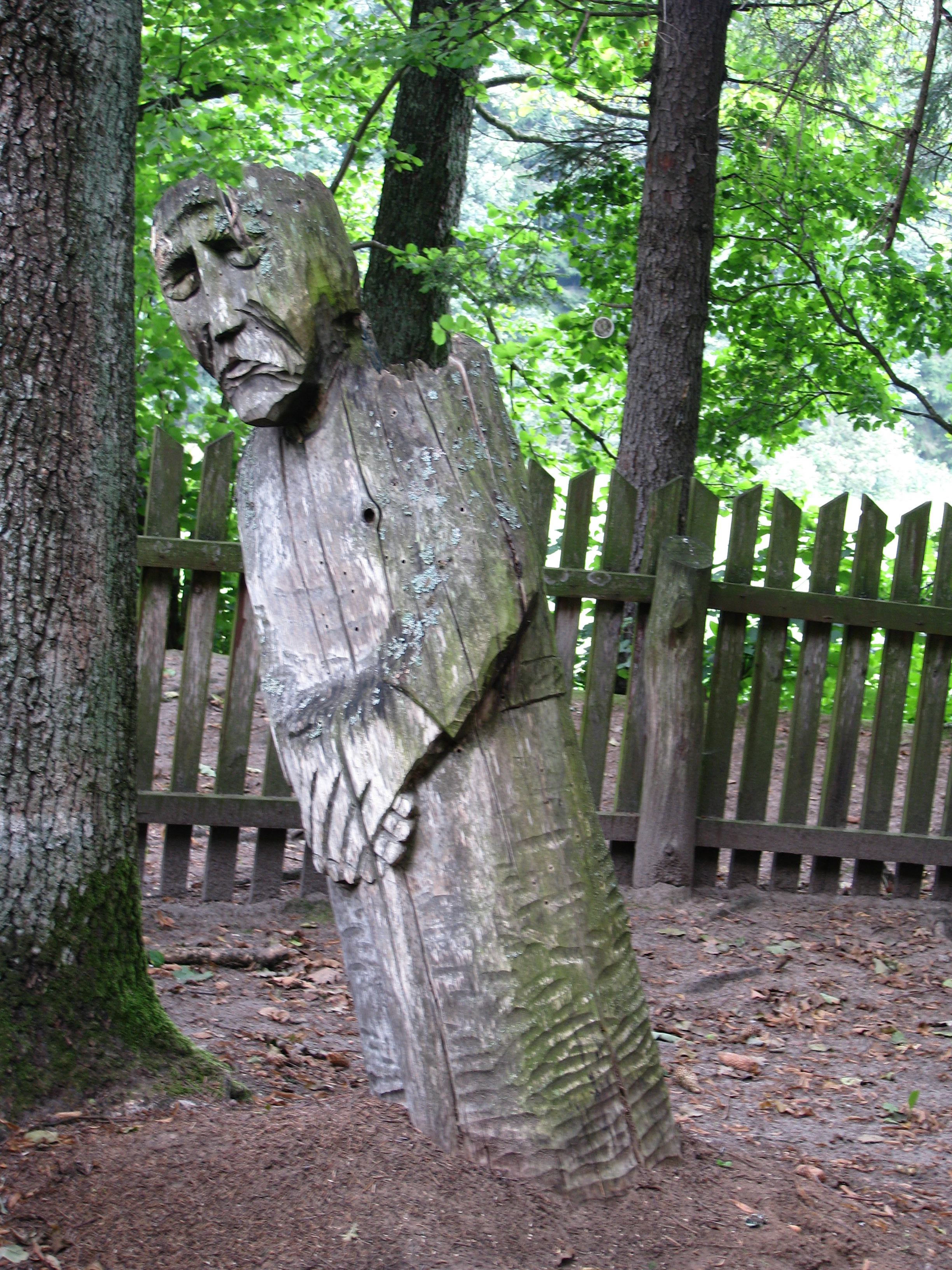 Świątek w Świętym Miejscu